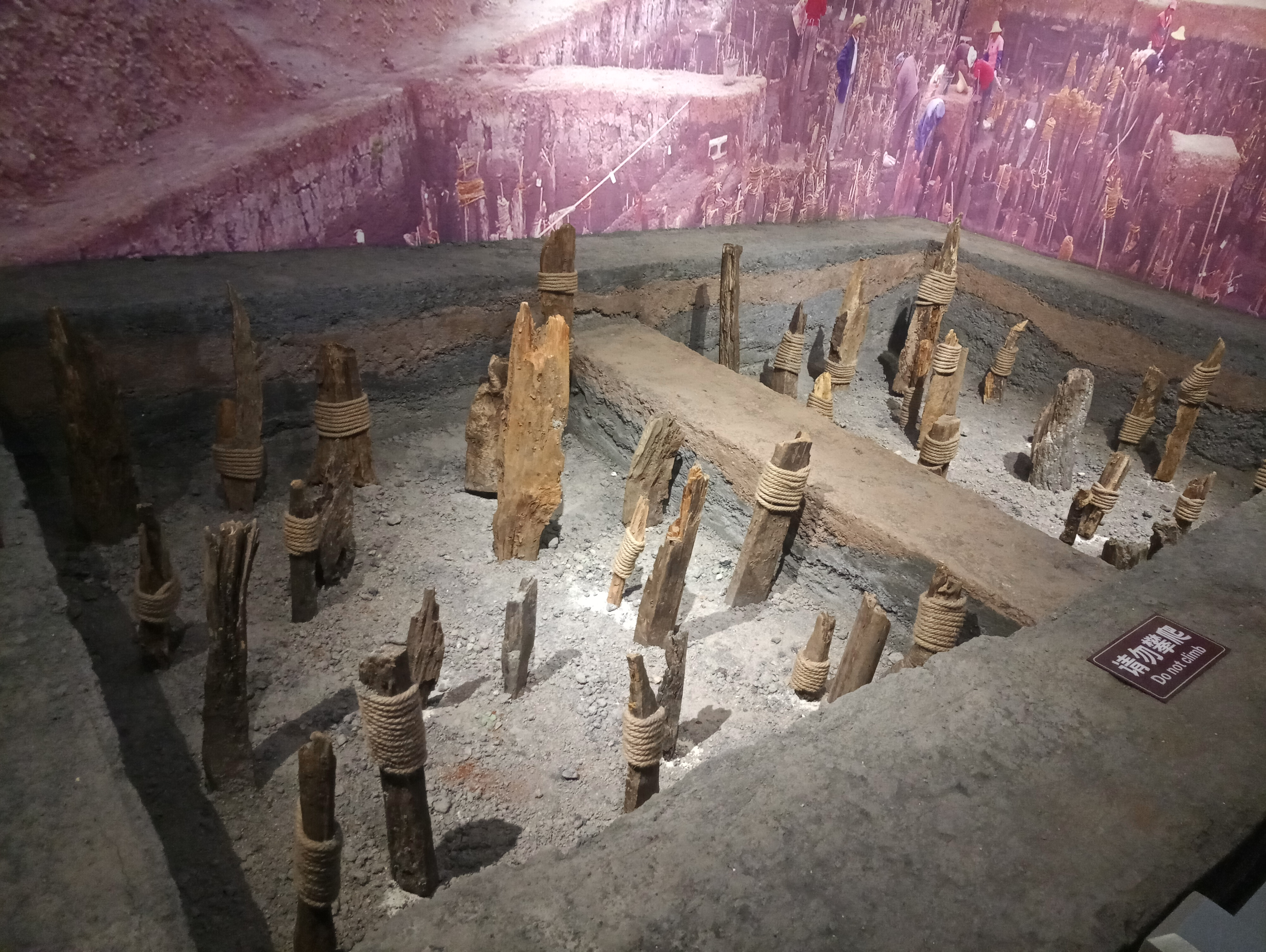 中文（中国大陆）: 大理州博物馆-新石器时代-剑川县海门口-干栏式建筑基底模型